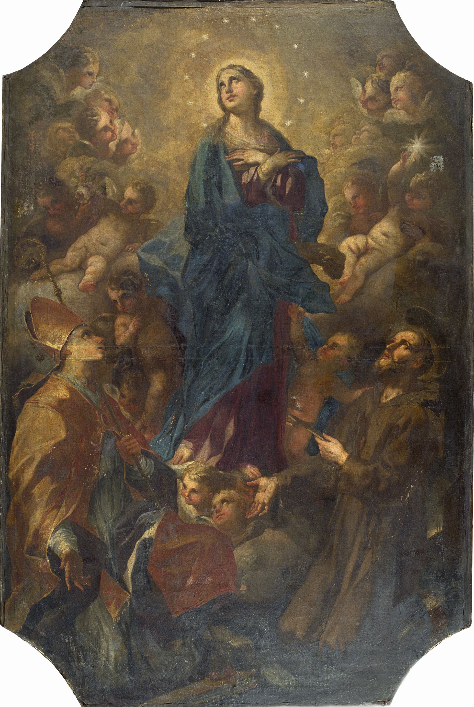 Glorificación de la Virgen, óleo sobre lienzo, 157 x 135 cm, Barcelona, Museu Nacional d'Art de Catalunya